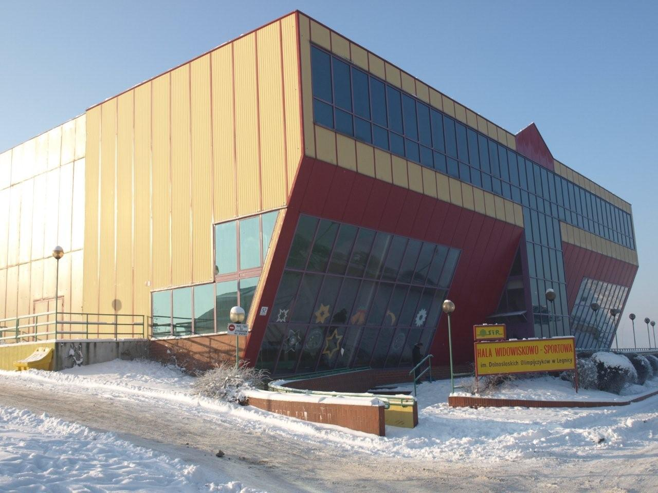 Hala im. Dolnośląskiech Olimpijczyków